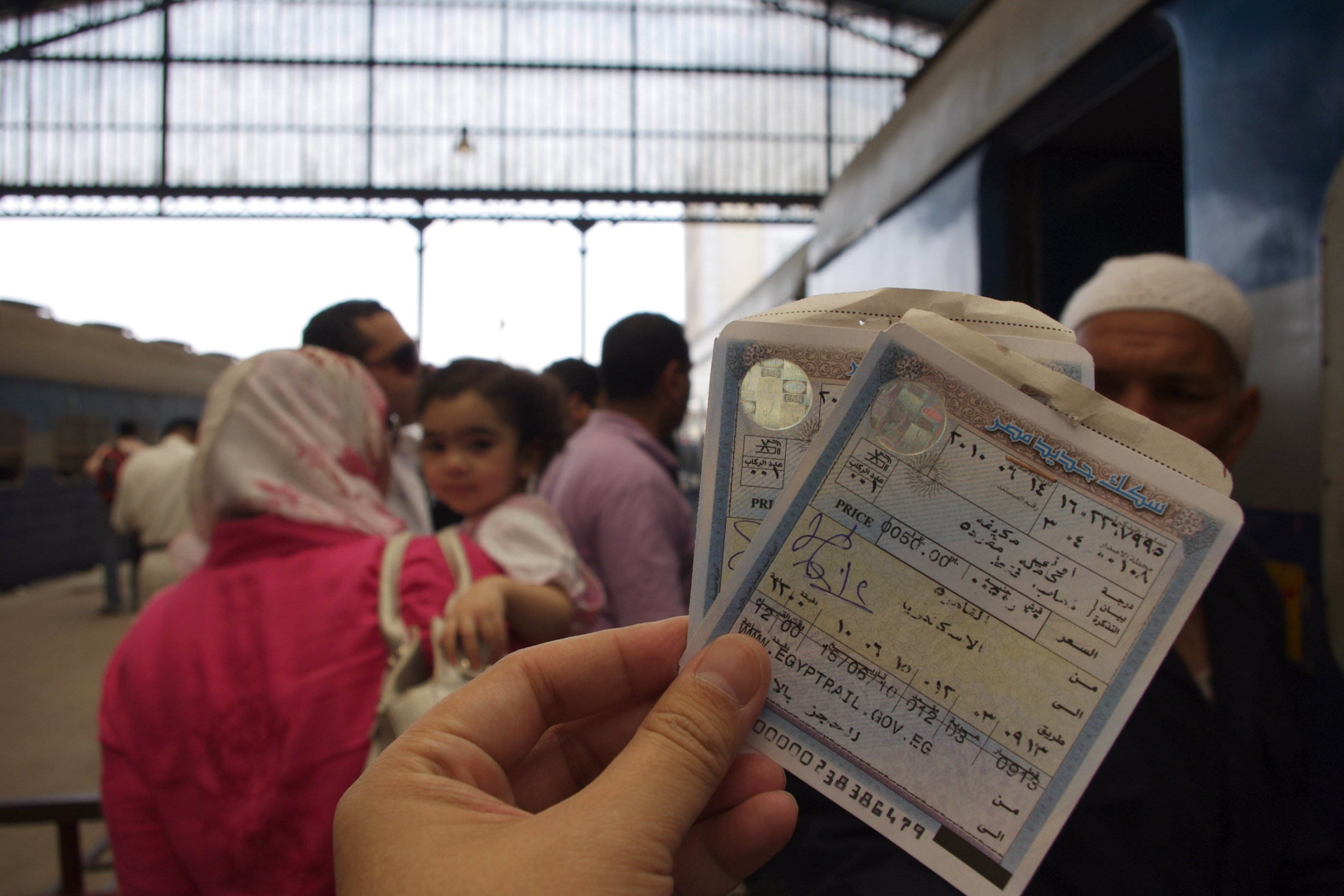 一票在手，樂趣無窮